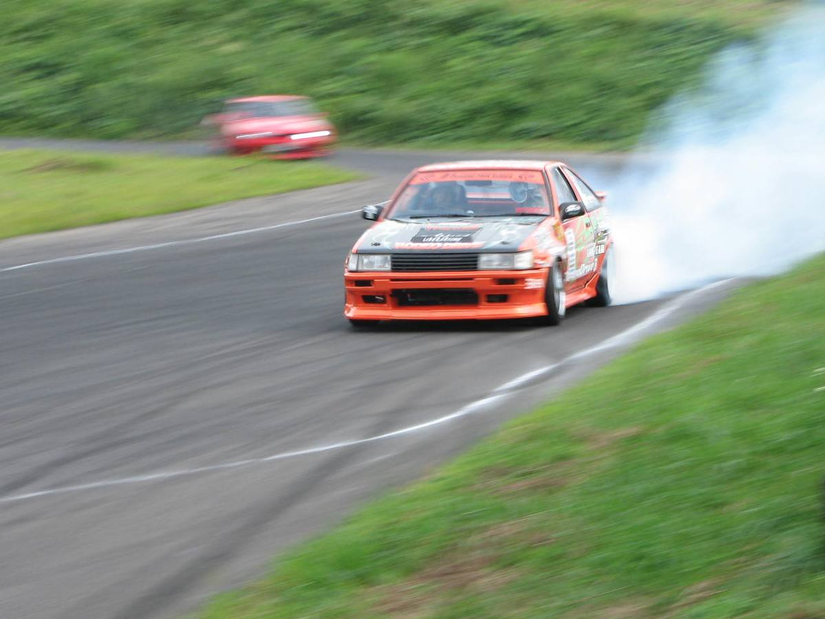 Drifting Toyota AE86.